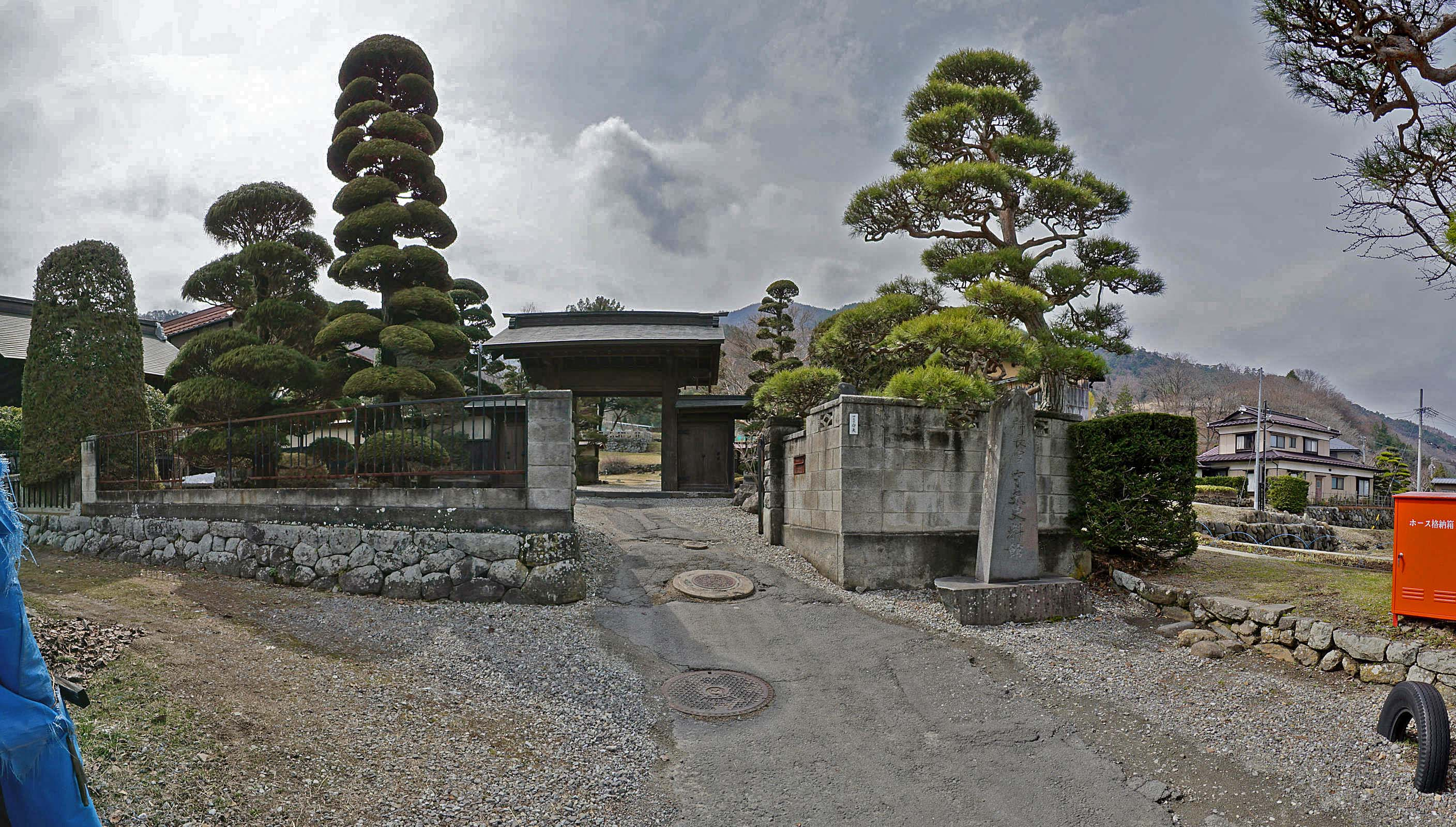 Moriya Archives museum , 神長官守矢史料館